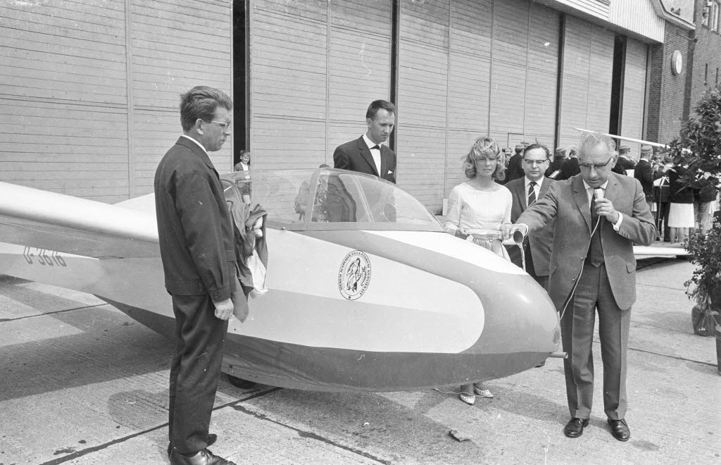 Der Direktor vom Anatomischen Institut Prof. Wolfgang Bargmann (1.v.r.) tauft das dritte Segelflugzeug mit der Nummer D-3676 auf den Namen CHRISTIAN ALBERTINA 300.